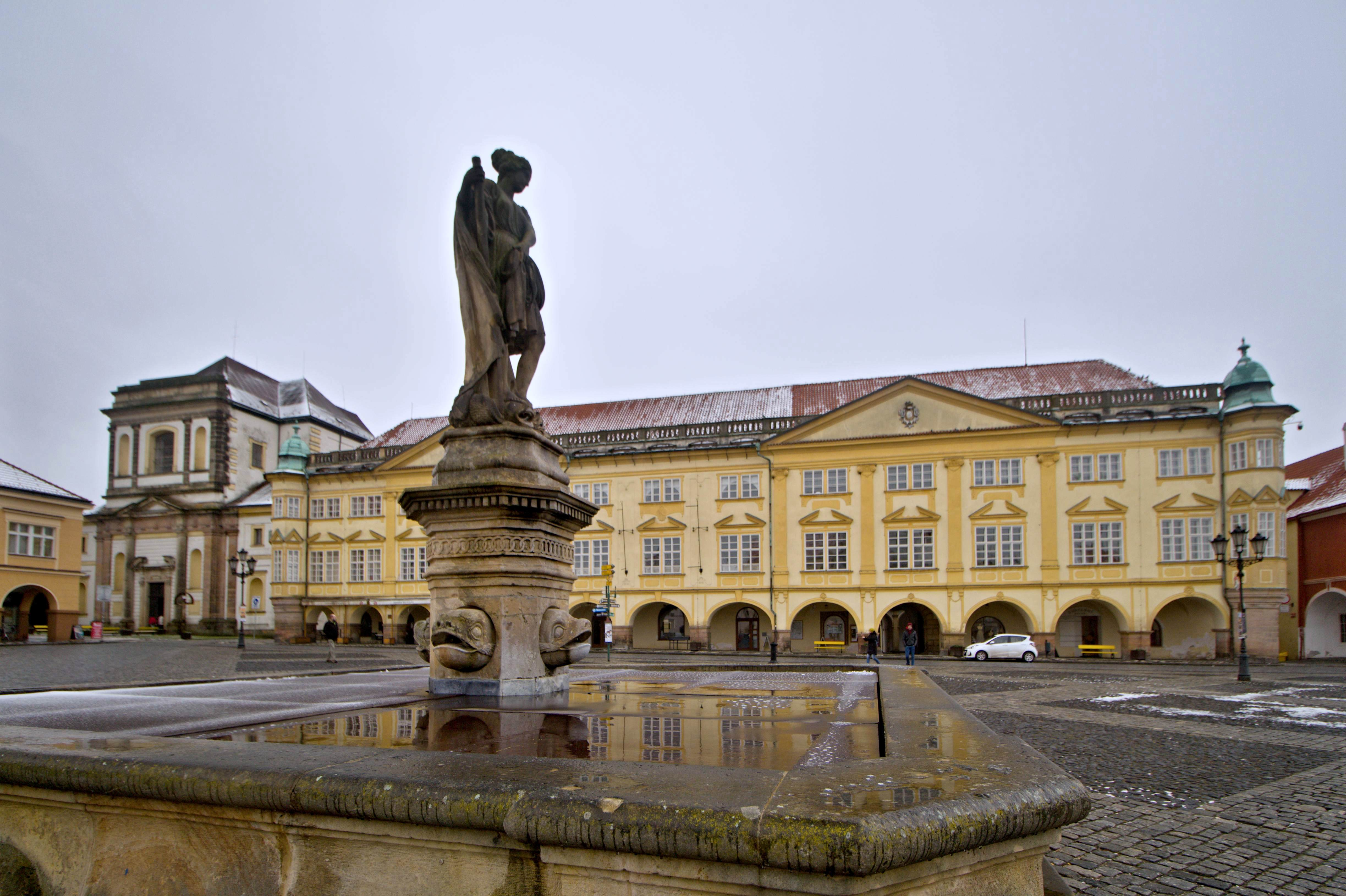 Valdštejnovo náměstí v Jičíně